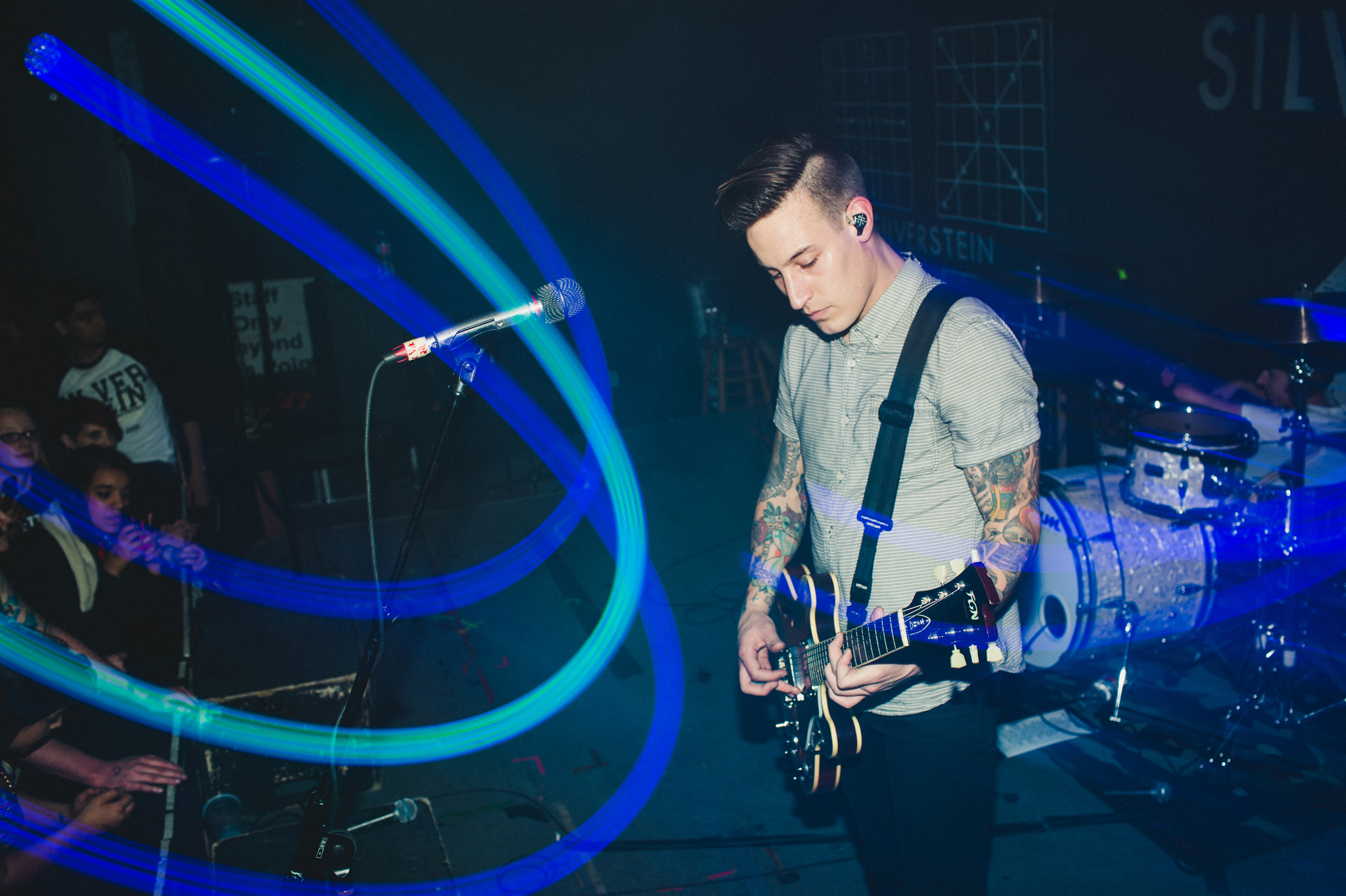 Paul Marc Rousseau, guitarist for Silverstein